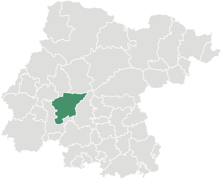 Mapa del municipio de Irapuato en el estado mexicano de Guanajuato